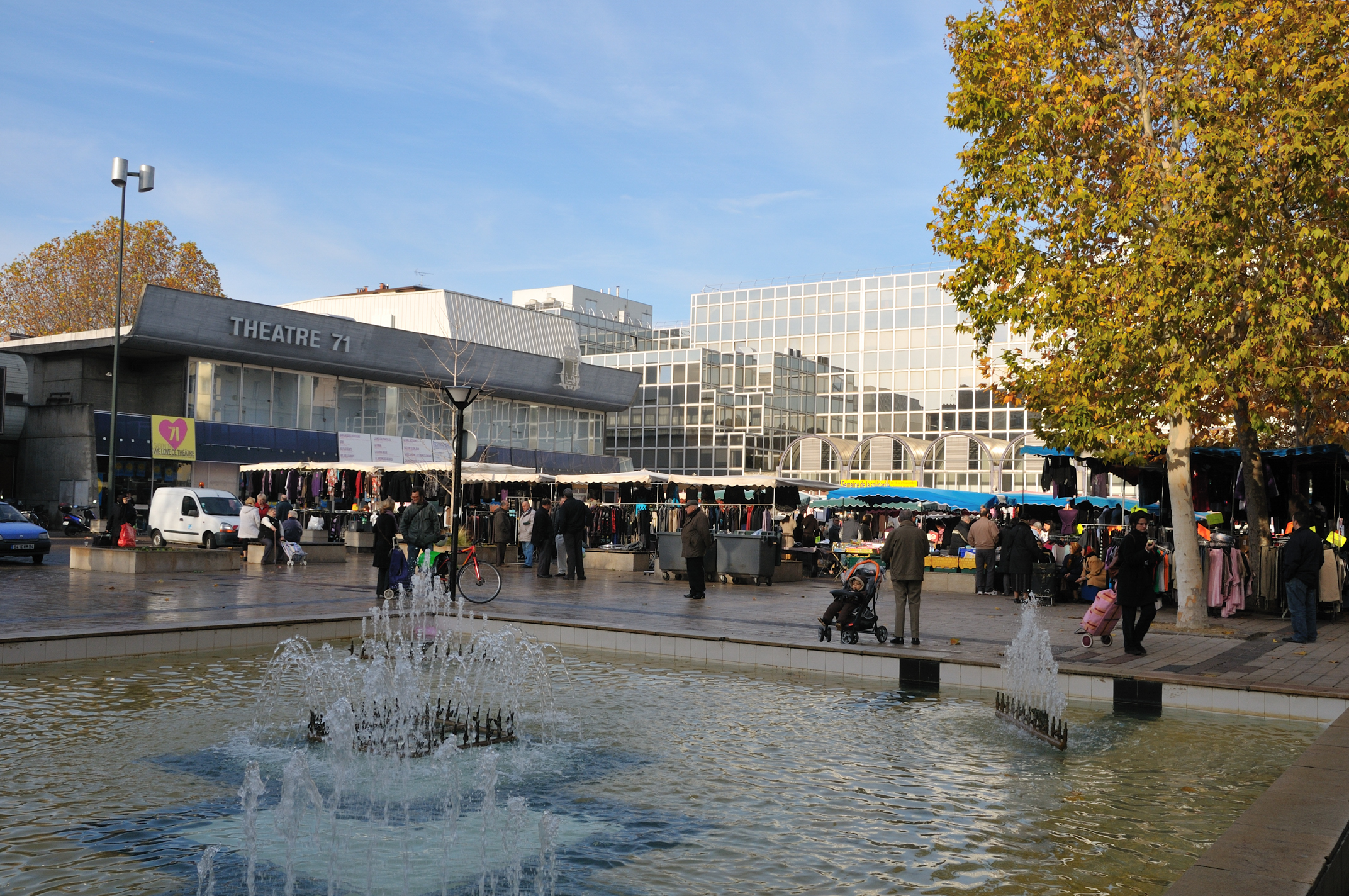 Place du 11 Novembre, Malakoff, Hauts-de-Seine, France